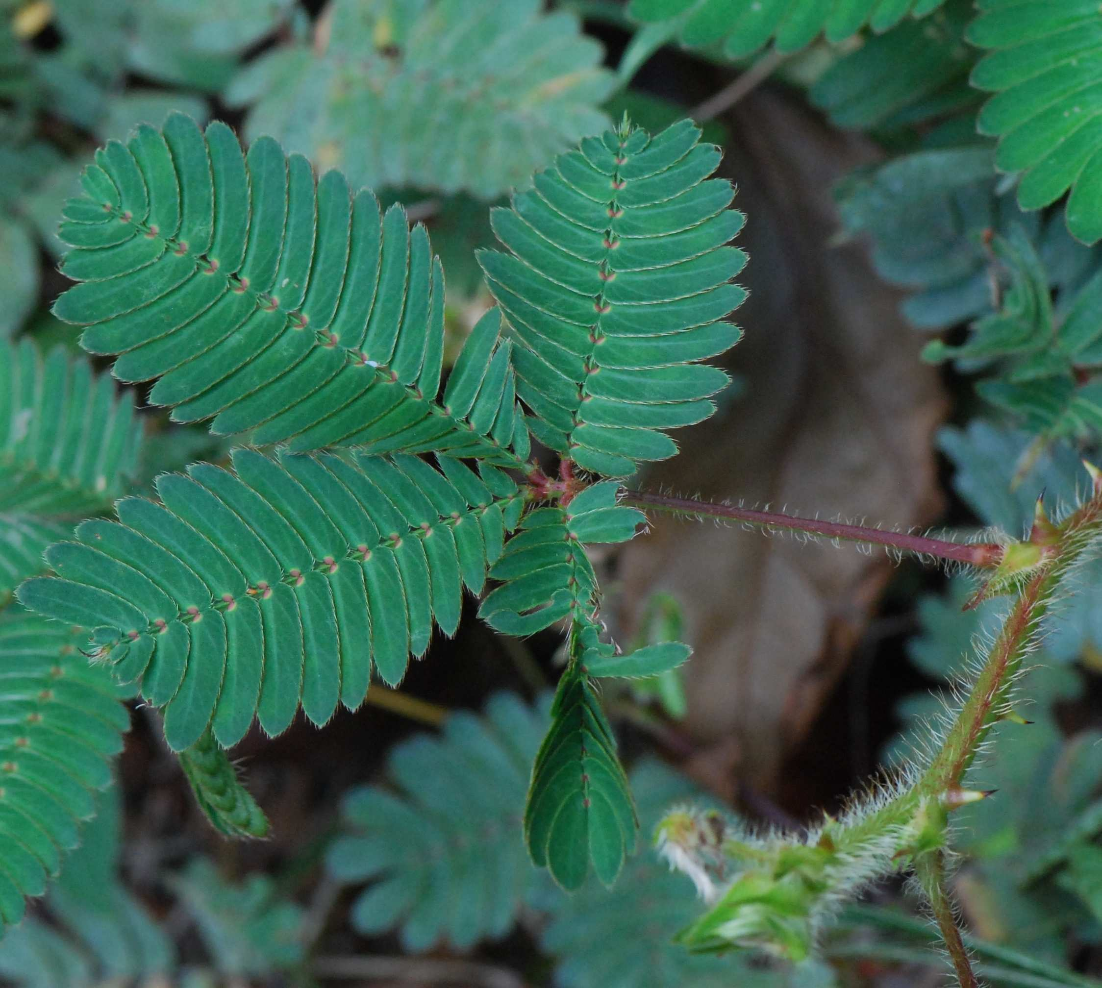 Mimosa pudica, feuille, Martinique